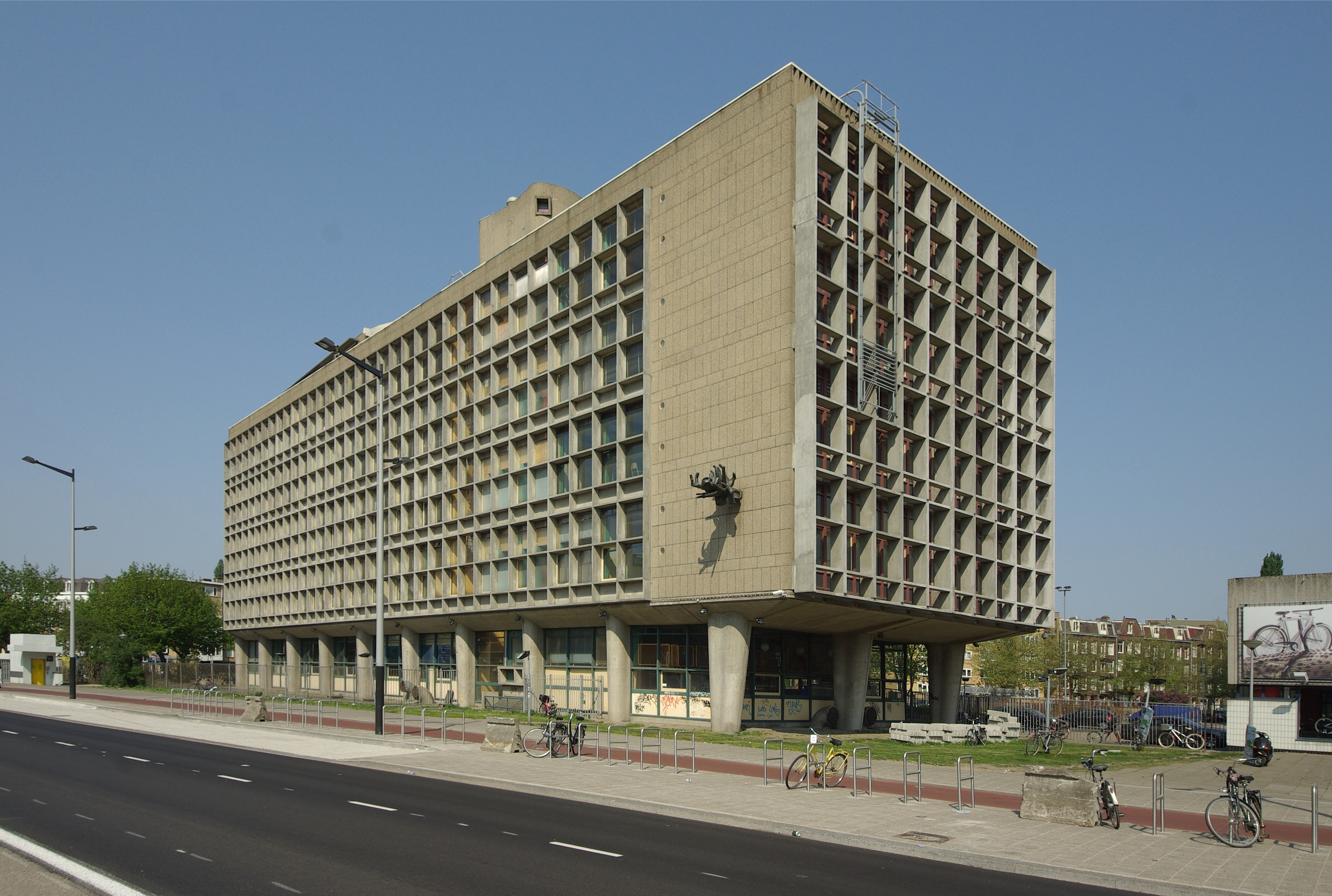 Voormalig schoolgebouw LTS/Patrimonium in de Vrolikstraat (Wibautstraat) in Amsterdam